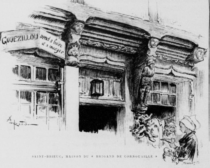 Saint-Brieuc : la maison du "brigand de Cornouaille", Guy Éder de La Fontenelle" vers 1900 (lithographie d'Albert Robida publiée dans "La vieille France, Bretagne" vers 1900). Selon la tradition rapportée par Albert Robida, cette maison lui aurait appartenu